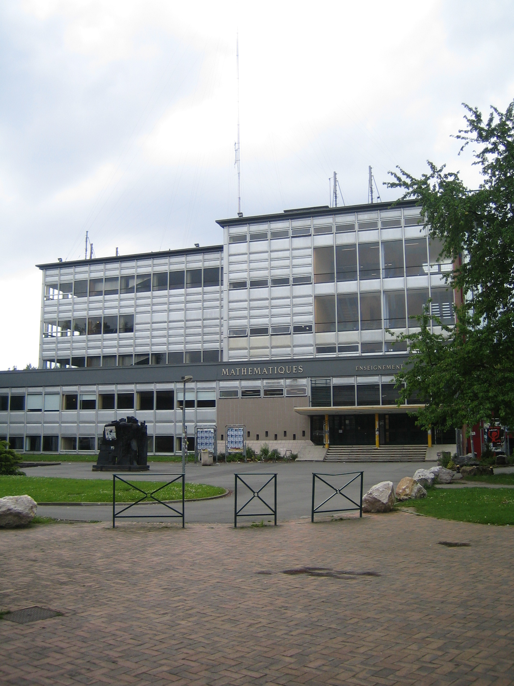 Bâtiment M1 de l'Université Lille 1, Villeneuve d'Ascq